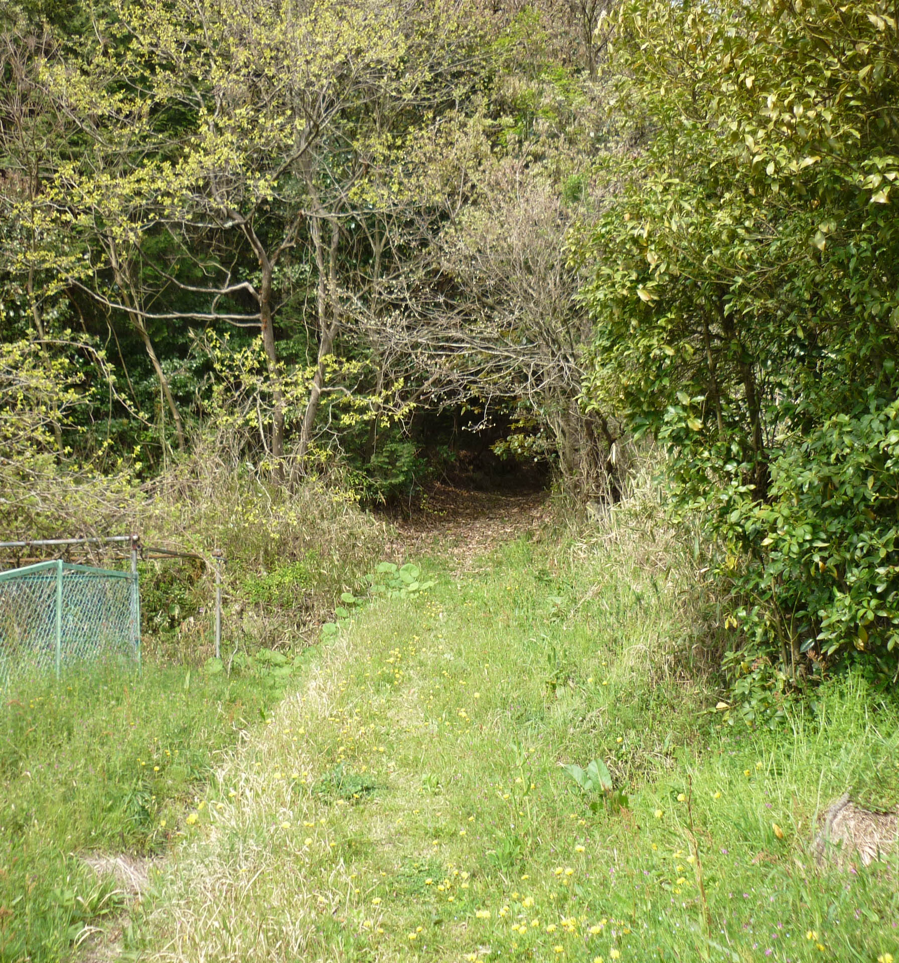 丸山城への登城口